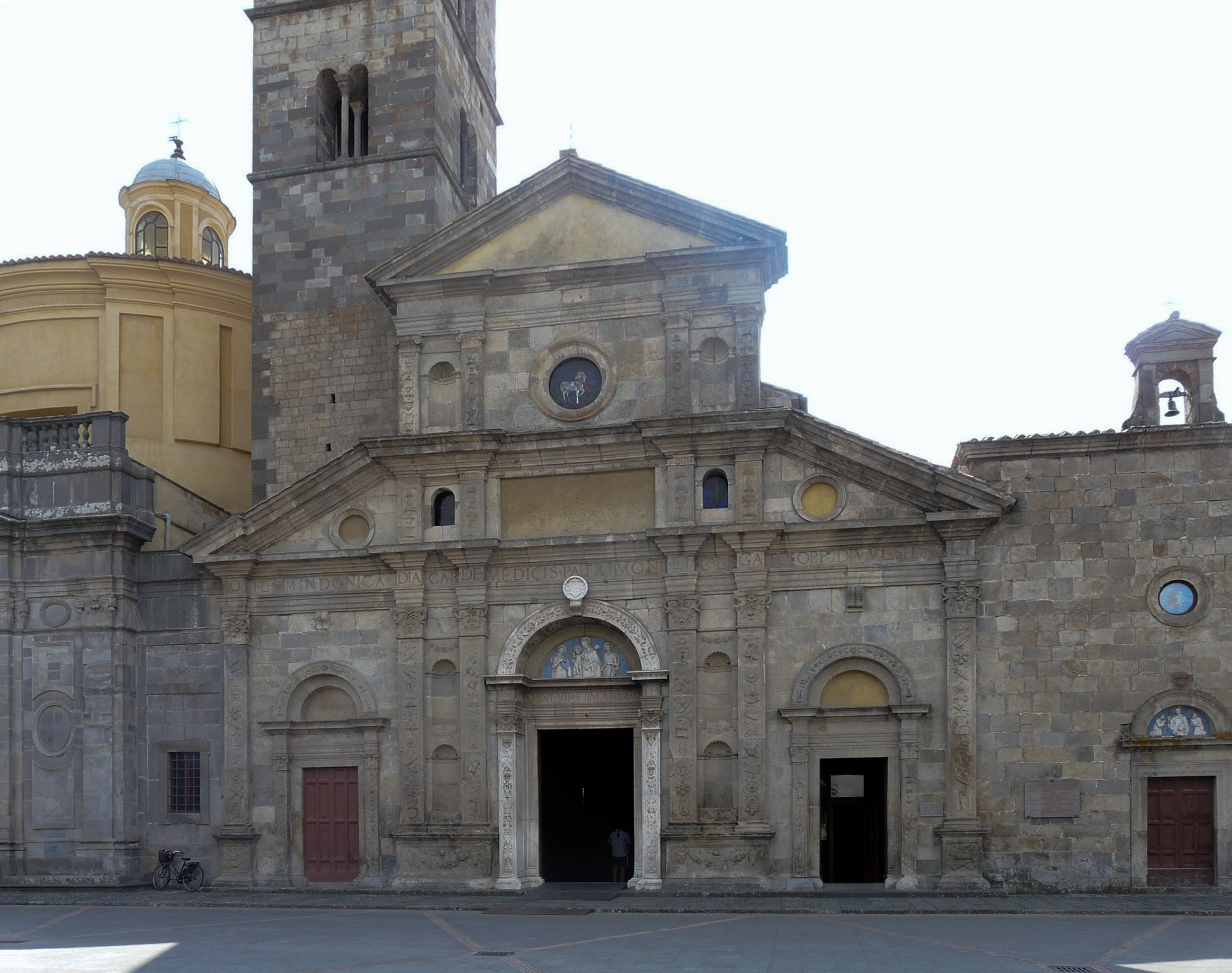 Basilica di Santa Cristina, Bolsena, Lazio, Italia